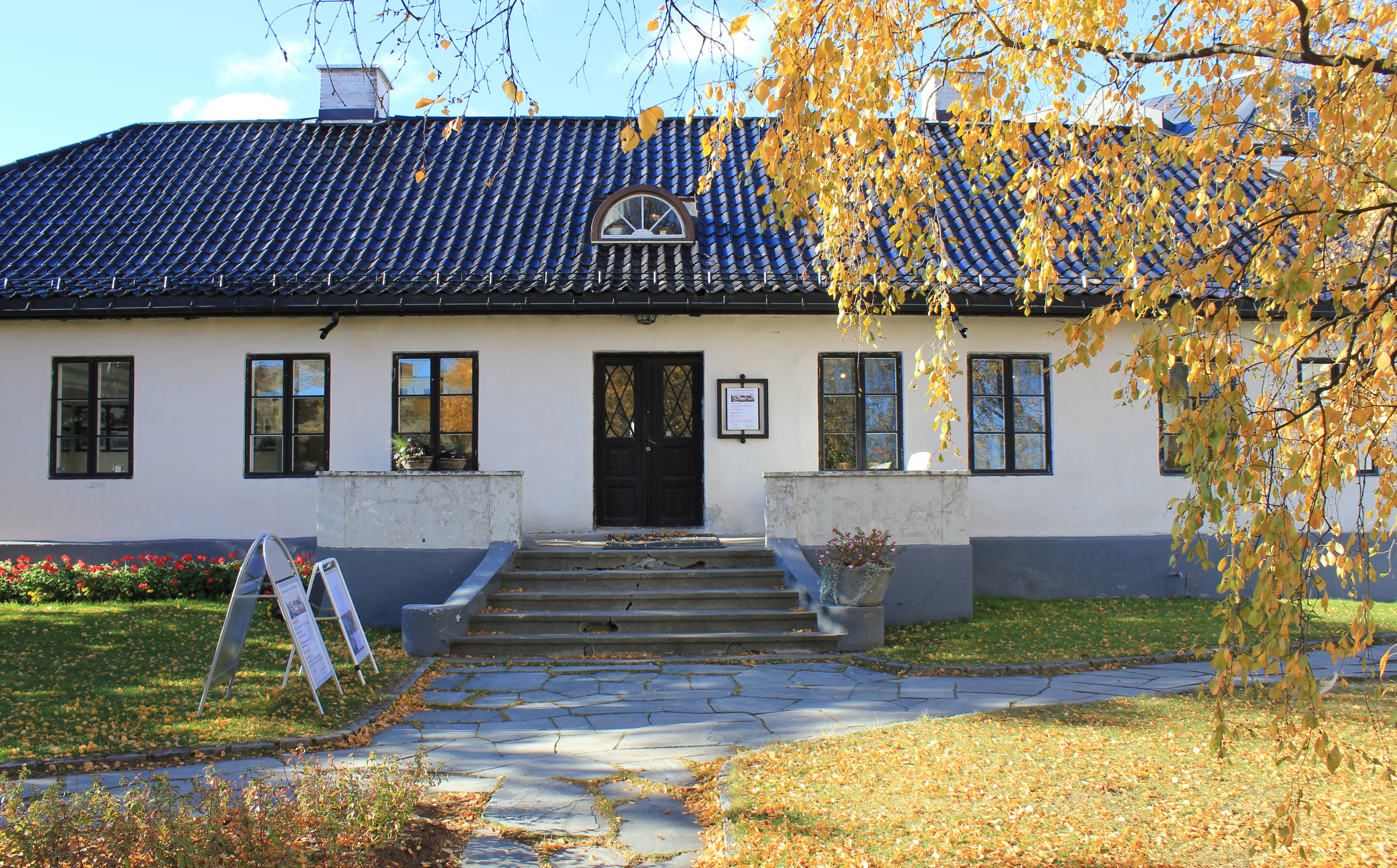 Kauffeldtgården ved Gjøvik. Nb! I tittelen er Kauffeldtgården feilaktig skrevet med en f! Kauffeldtgården ligger ved siden av biblioteket og er foruten bygningsmassen på Gjøvik Gård byens eneste gjenværende bygning fra glassverkstida. Gården ble bygget tidlig på 1800-tallet og fredet i 1966, opprinnelig benyttet som bolig og verksted for læregutter, i 1854 solgt til Edvard Olsen fra Borregård og omdisponert til kombinert bolig og landhandleri[1]. I dag huser bygget kontorene til Gjøvik kunstforening og Gjøvik historielag, her er kunstutstillinger og informasjon om byens glassverkshistorie med mer.